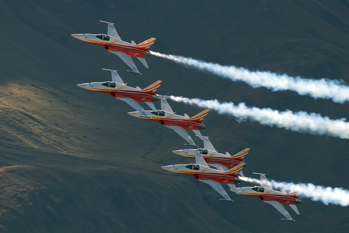 Axalp Airshow 2009